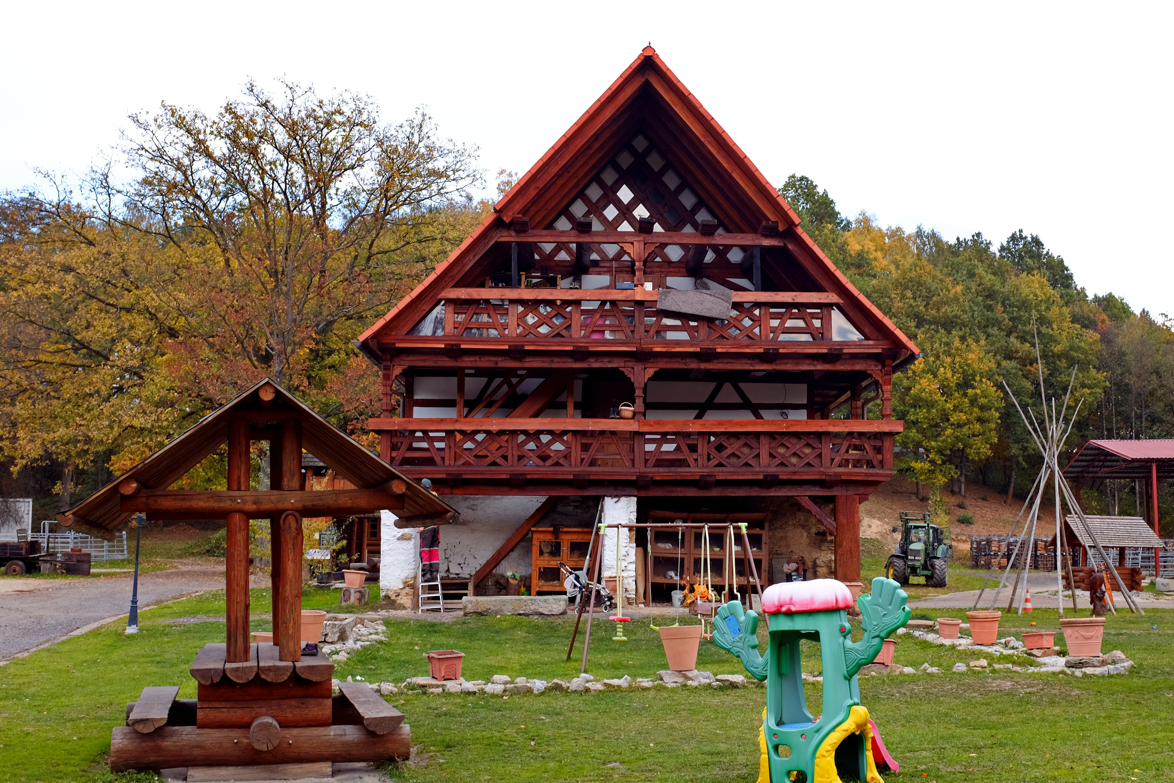 Usedlost čp. 12, Mlýnek 12, Mlýnek (Nový Kostel).